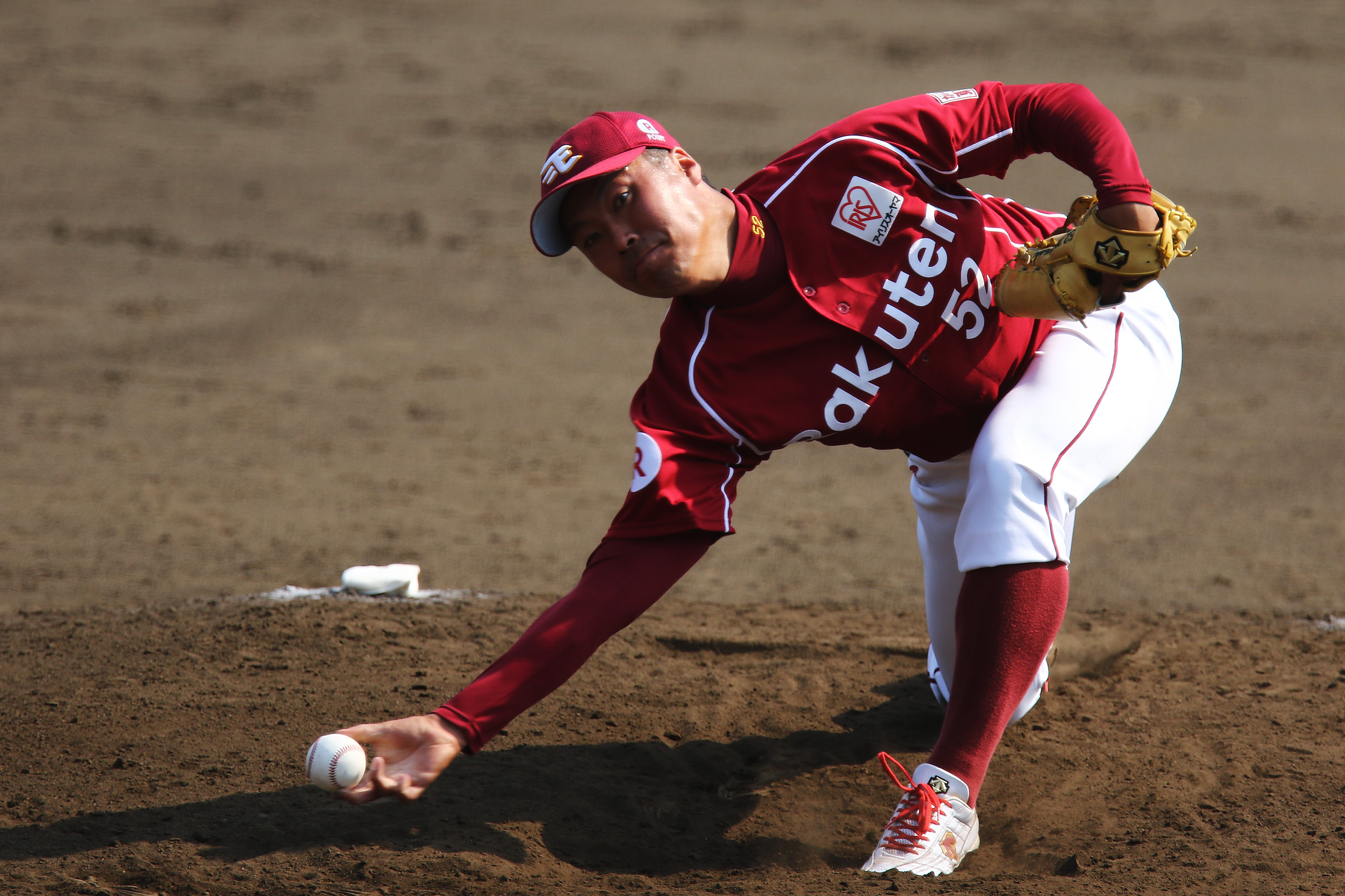 東北楽天ゴールデンイーグルスの加藤正志